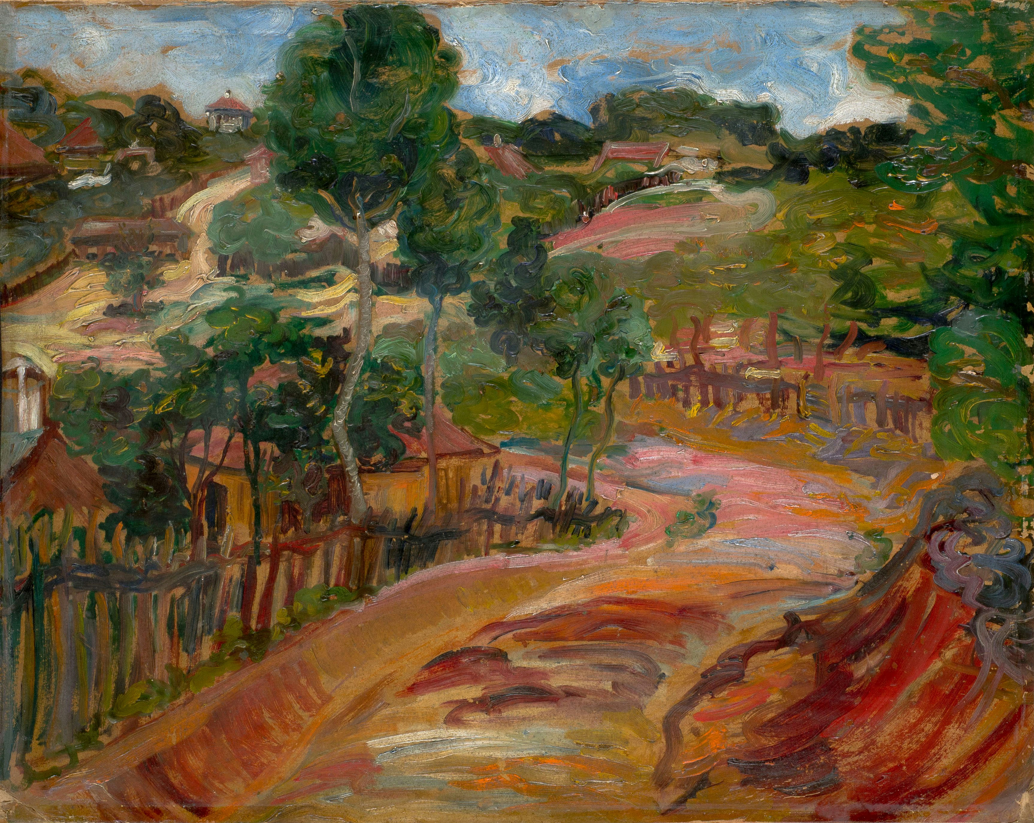 Nadežda Petrović